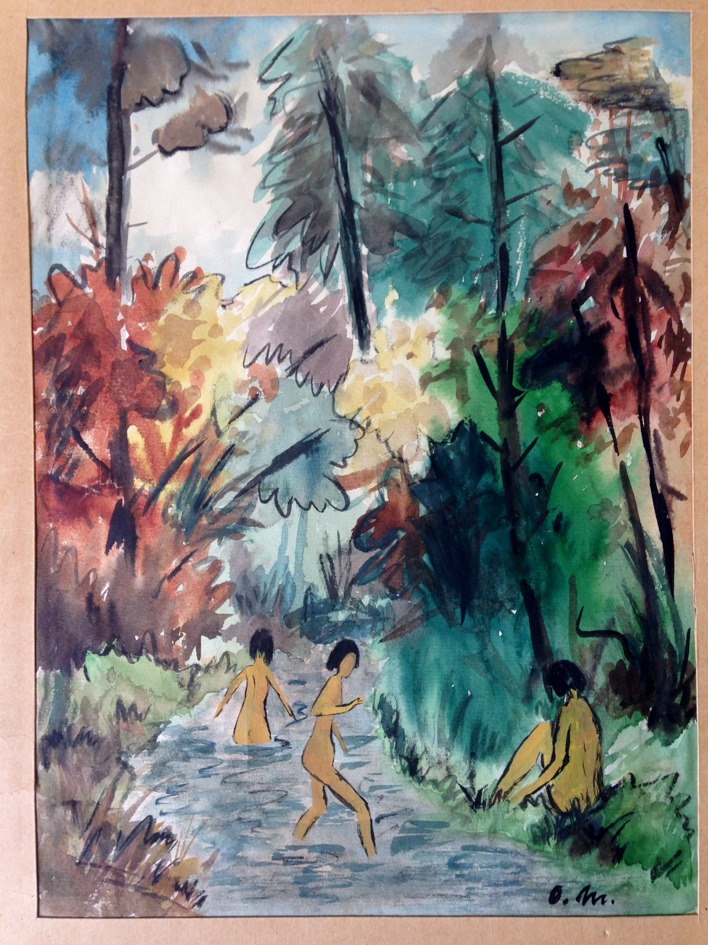 Otto Mueller. Natur mit Badenden